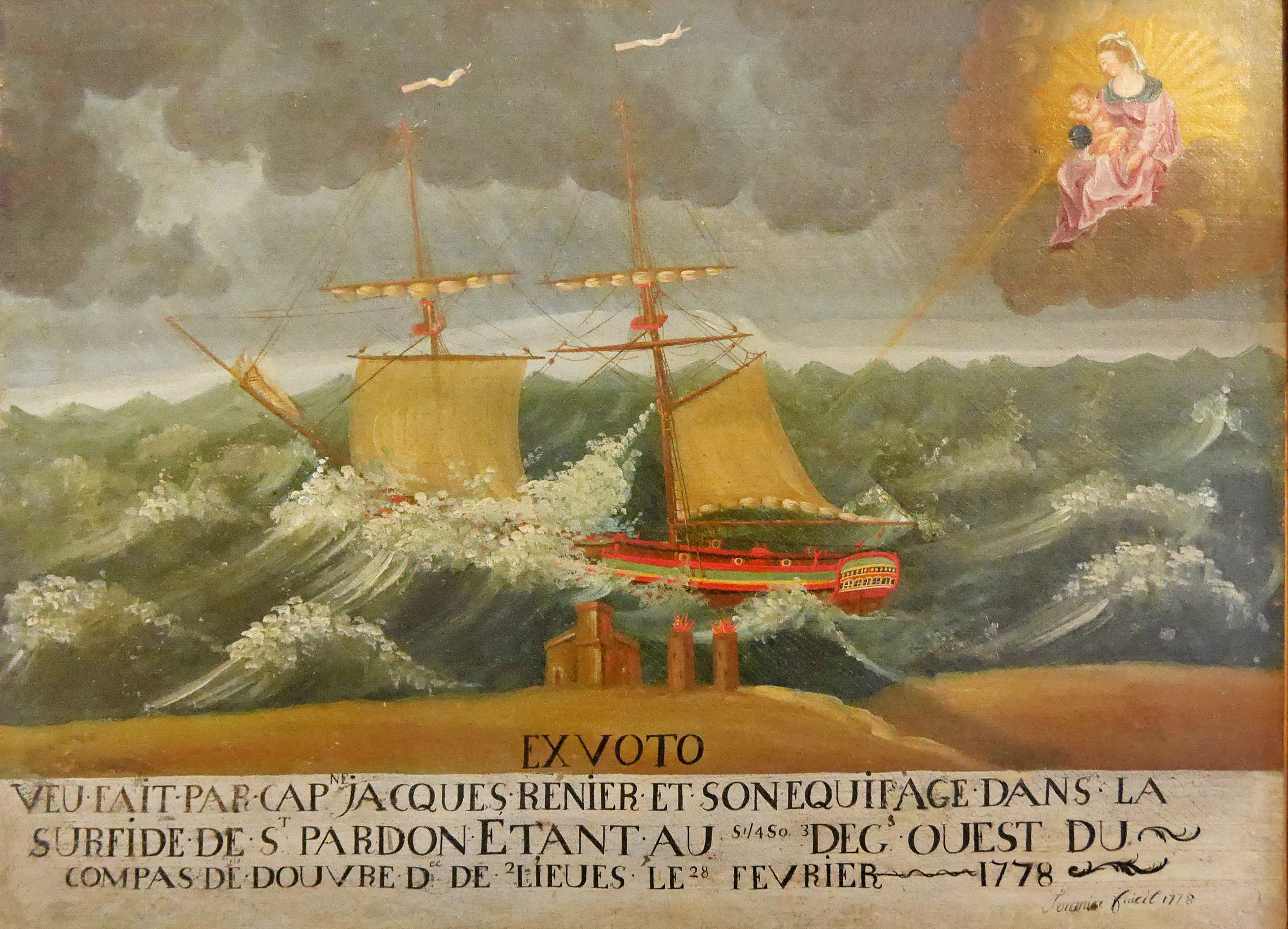 Ex voto-01-1778